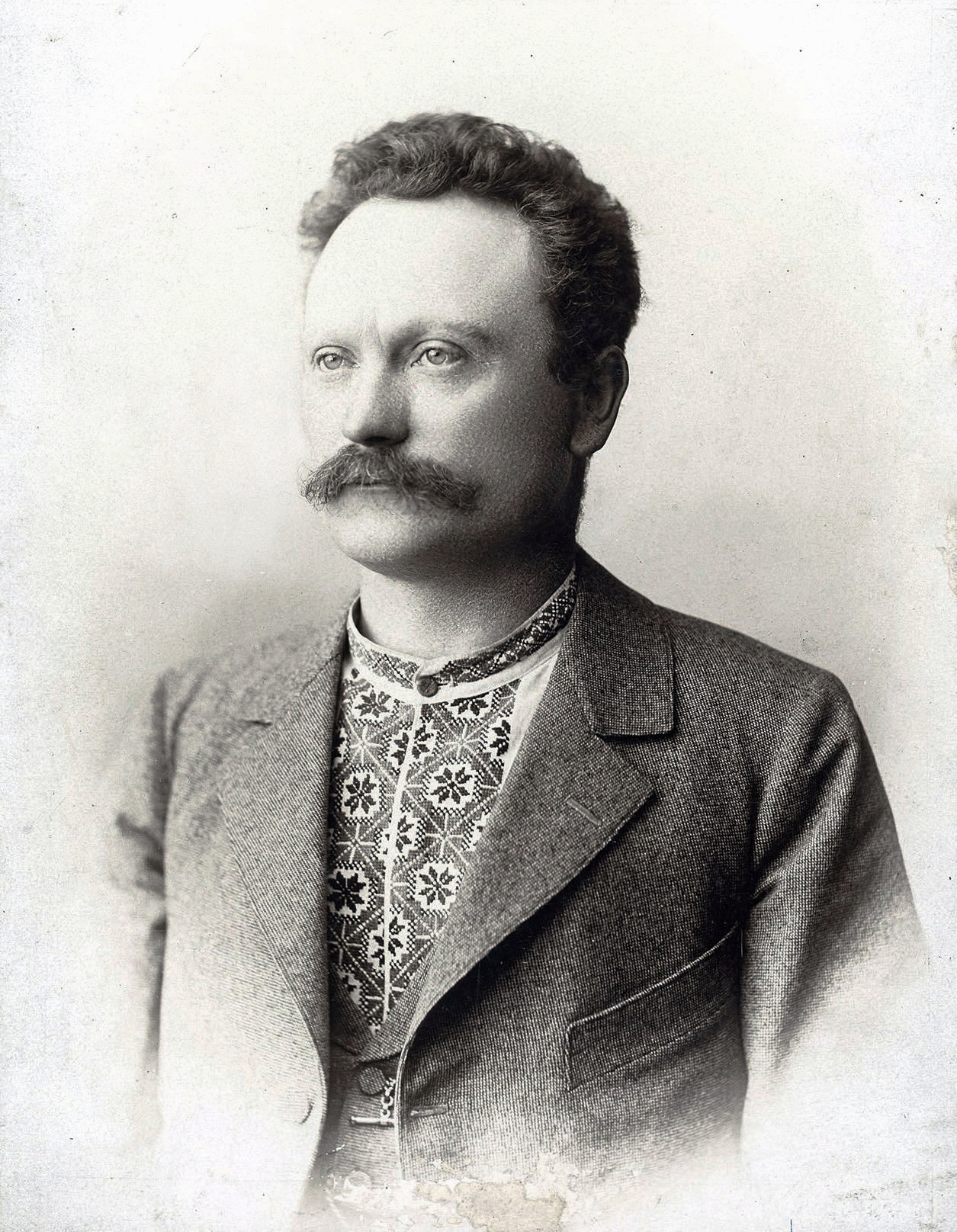 Іван Франко. Фотопортрет